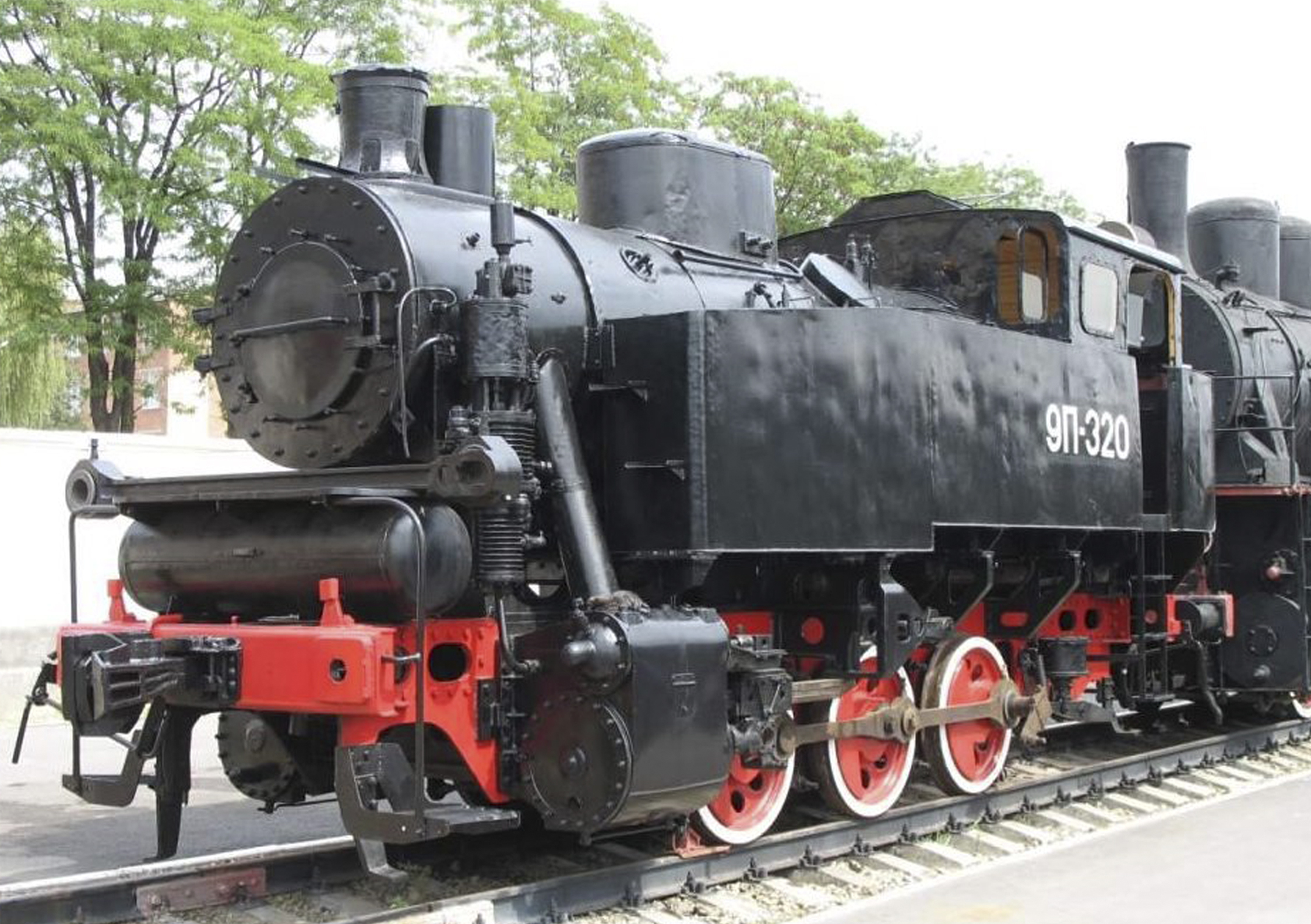 Паровоз построен в 1949 году Муромским паровозостроительным заводом